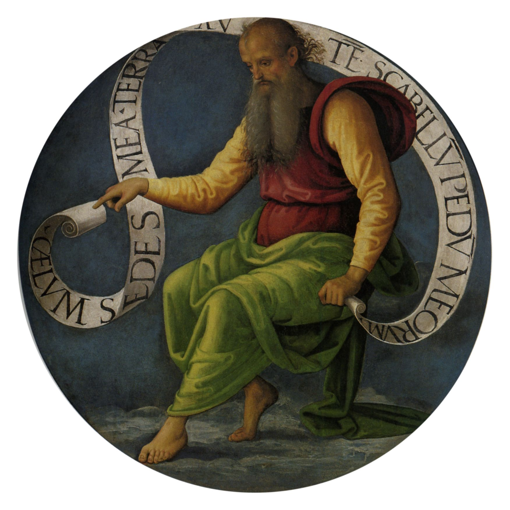 Pietro Perugino: Polittico di San Pietro (Profeta Isaia), Musée des Beaux-Arts de Nantes, France. Cat. no. 48 in Vittoria Garibaldi: Perugino. Catalogo completo. Octavo, Firenze 2000, ISBN 88-8030-091-1